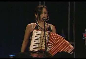 Julieta @ Latv 2004